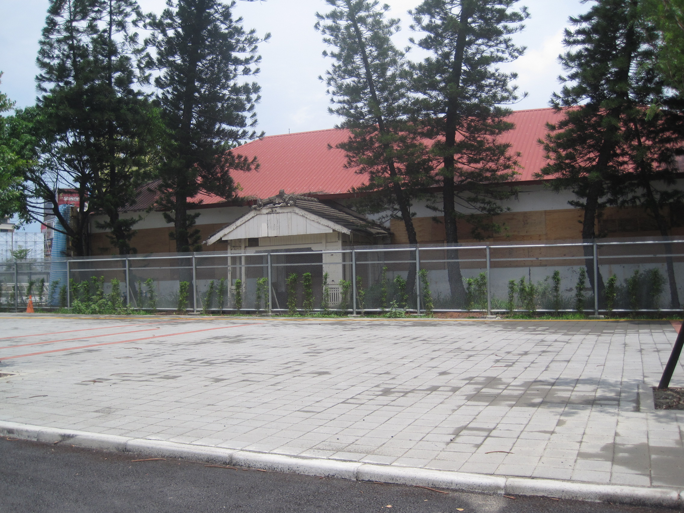 臺南避病院